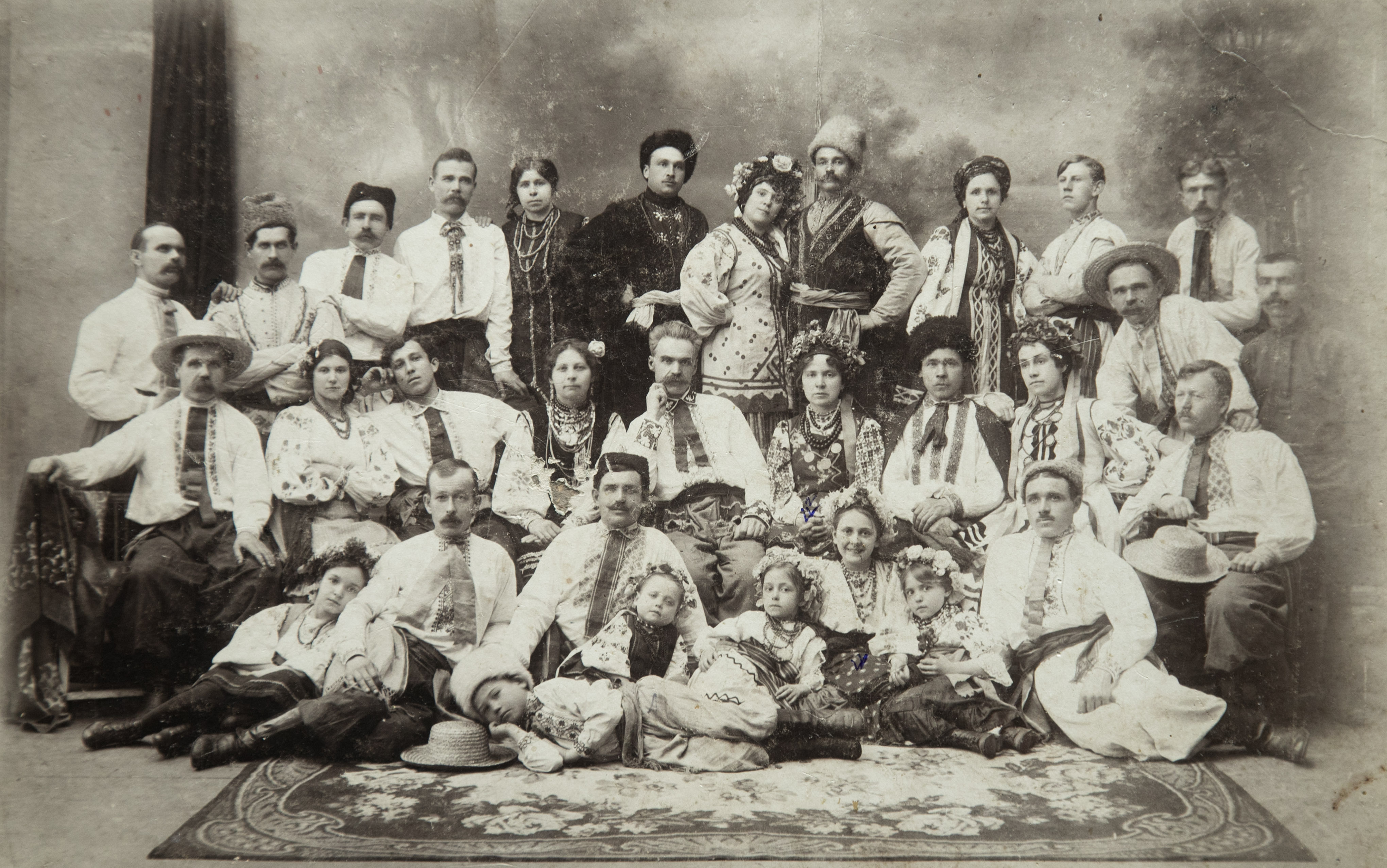 Предположительно, фотография сделана во время гастролей. Предположительно в среднем ряду шестая слева Евфросиния Писанецкая (Арефьева) - невестка Константина Ипполитовича Ванченко-Писанецкого. Фотография переснята с семейного фотоархива в декабре 2016 года.